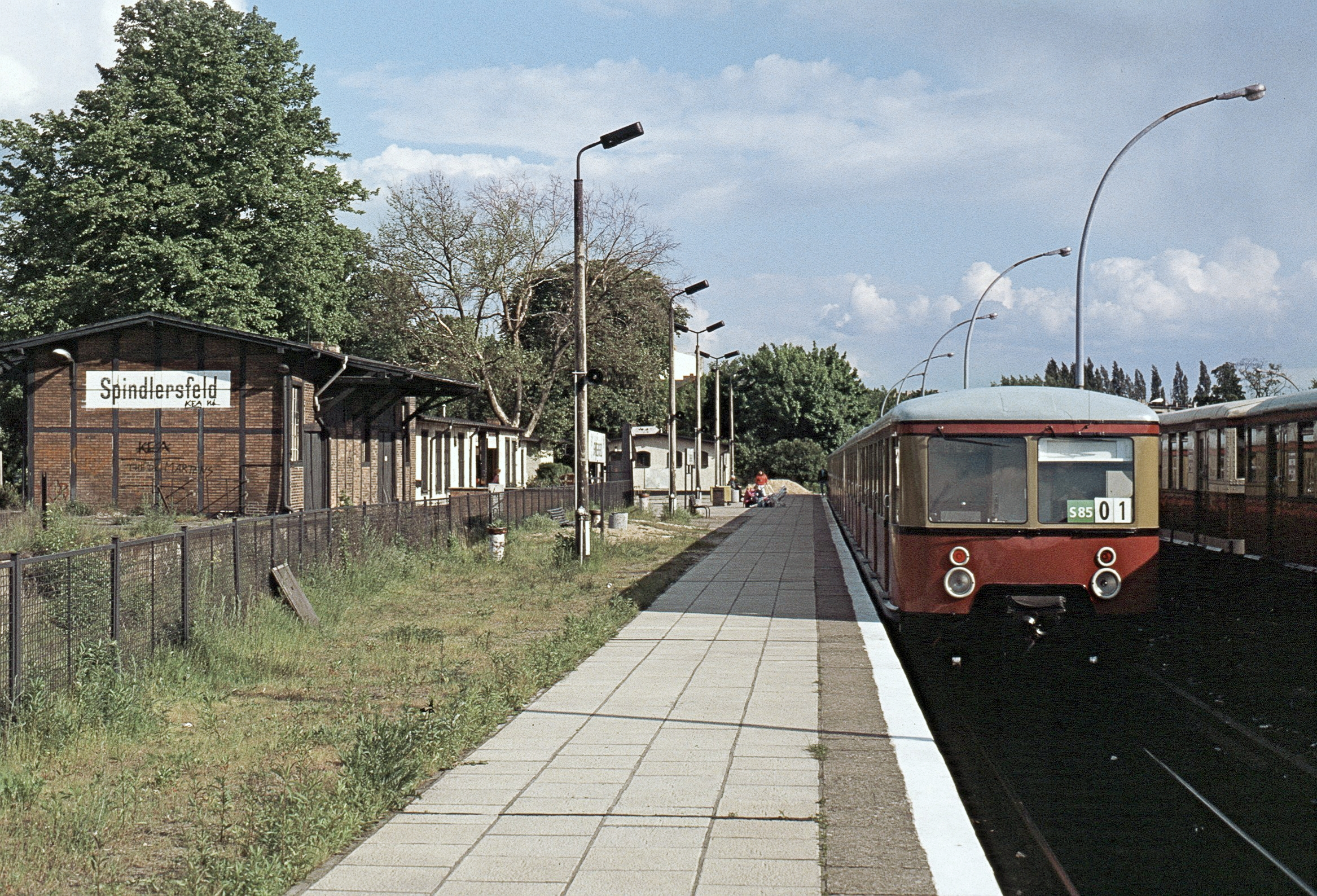 Bahnhof Berlin Spindlersfeld